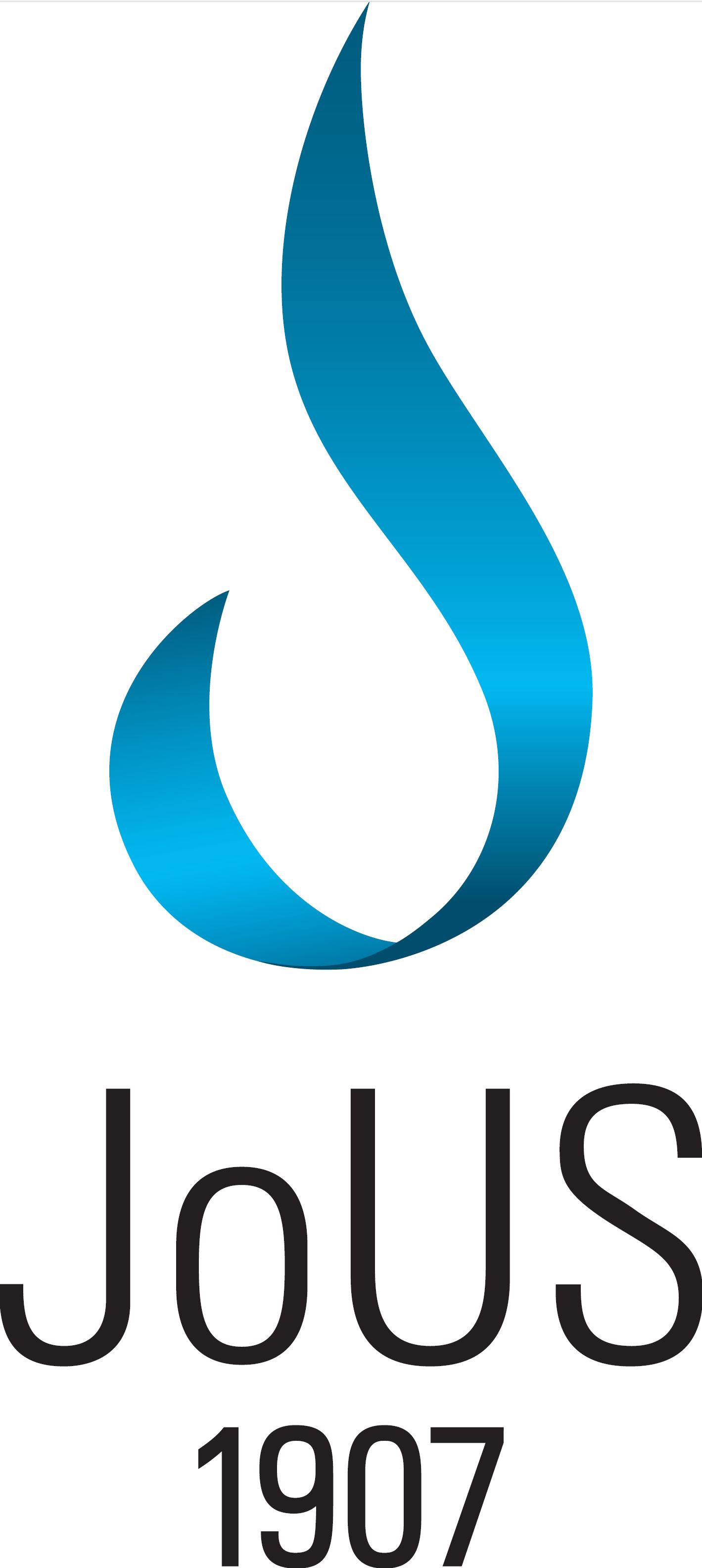 JoUS logo